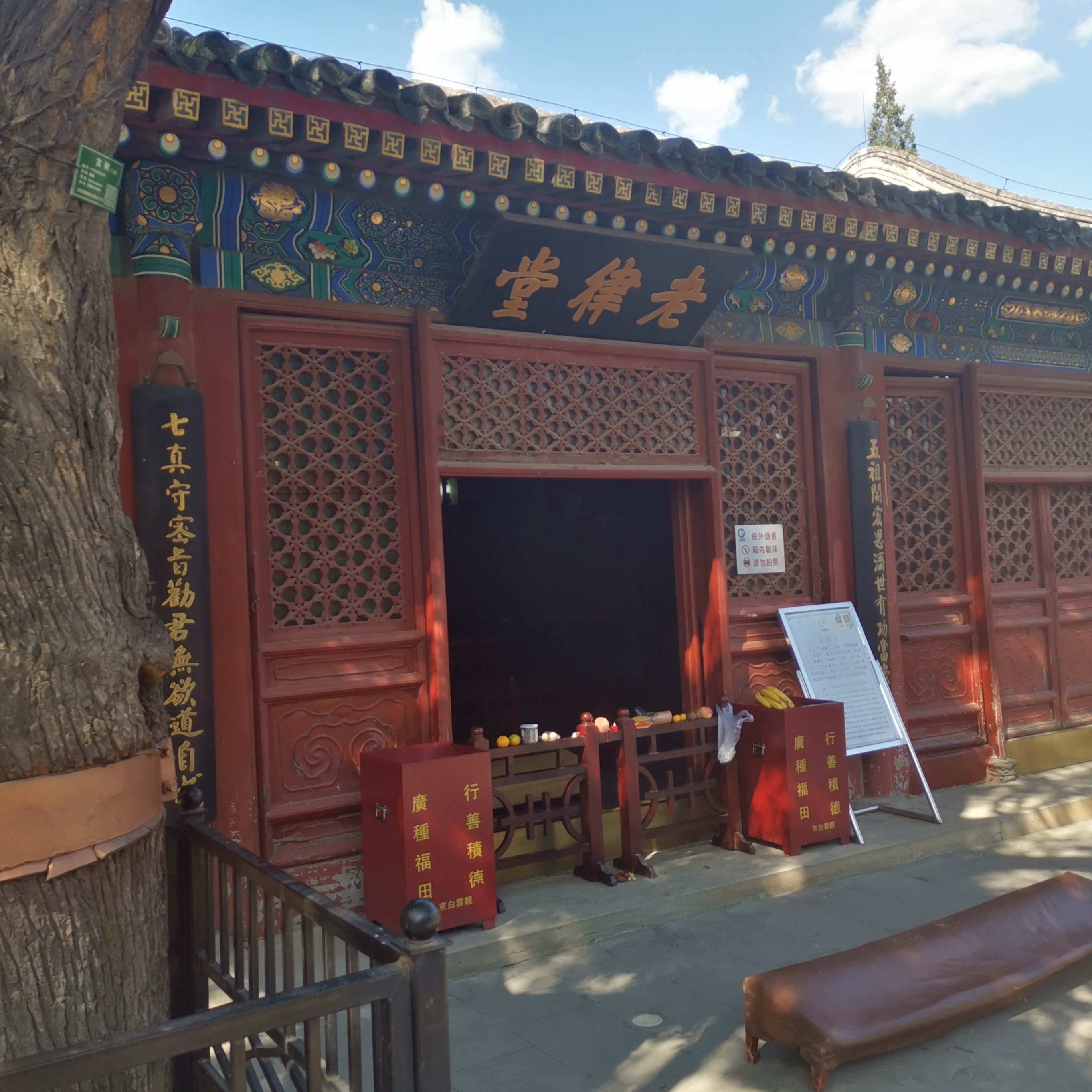 中文（中国大陆）: 北京zh:白云观供奉北七真的老律堂